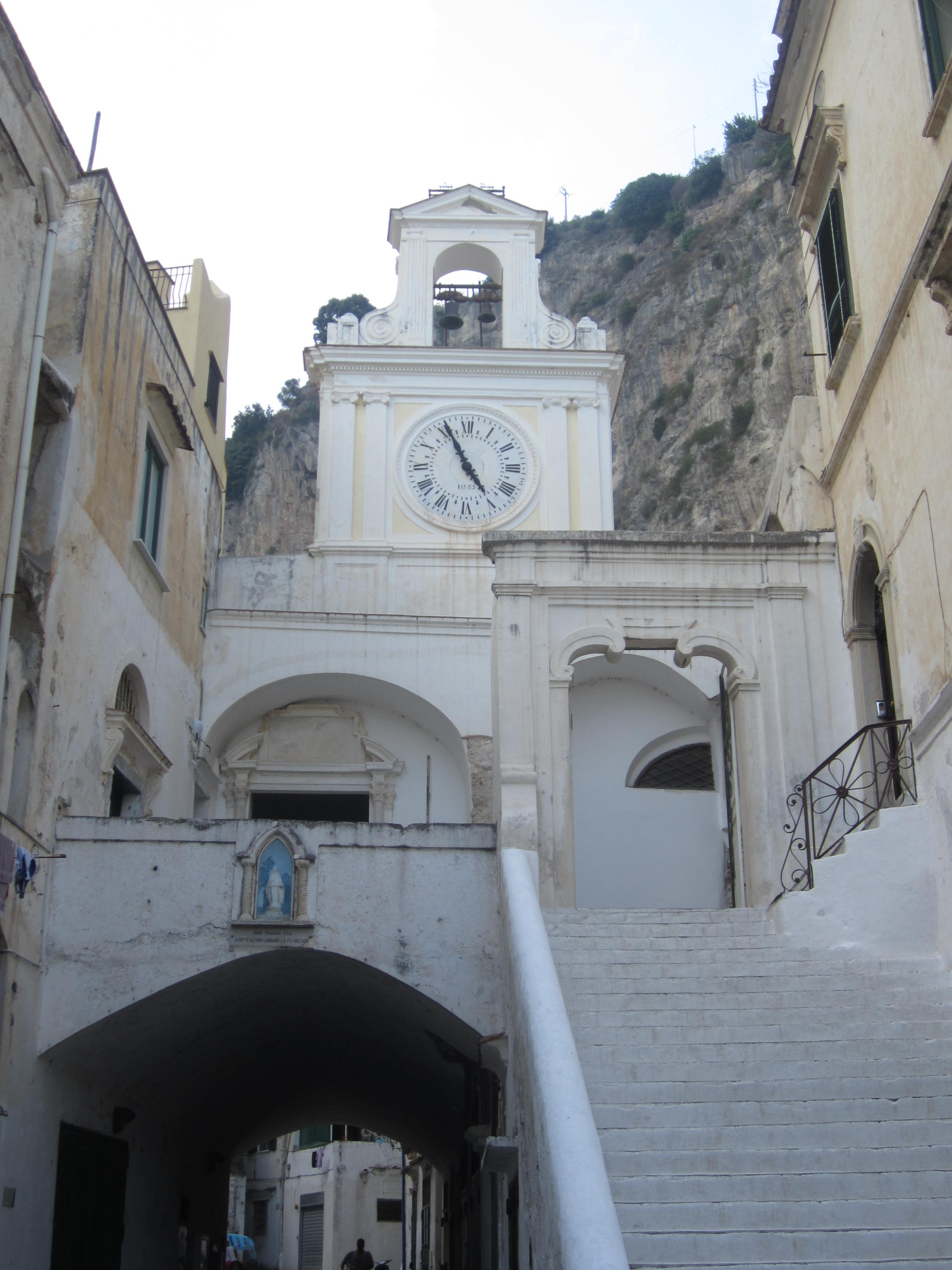 Chiesa di San Salvatore de' Birecto ad Atrani (SA)